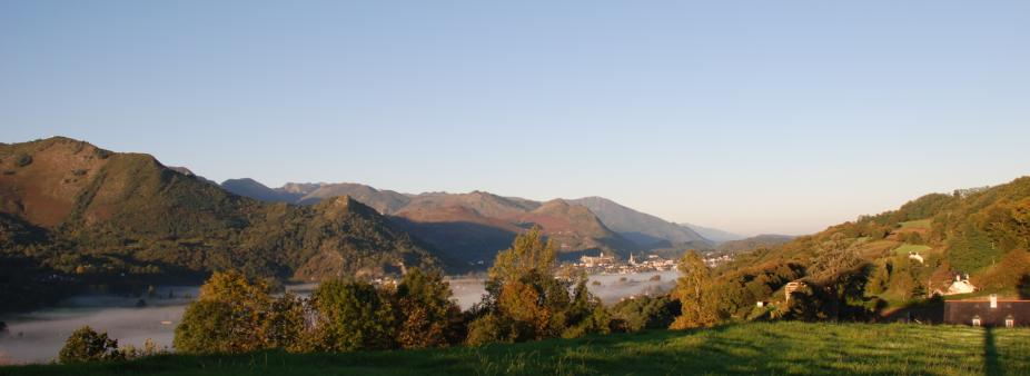 Brumes du matin sur la plaine de Lézignan et la ville de Lourdes au soleil levant par une belle journée d'octobre. Photographie prise depuis Bourréac (Lieu : Ets cazalas)